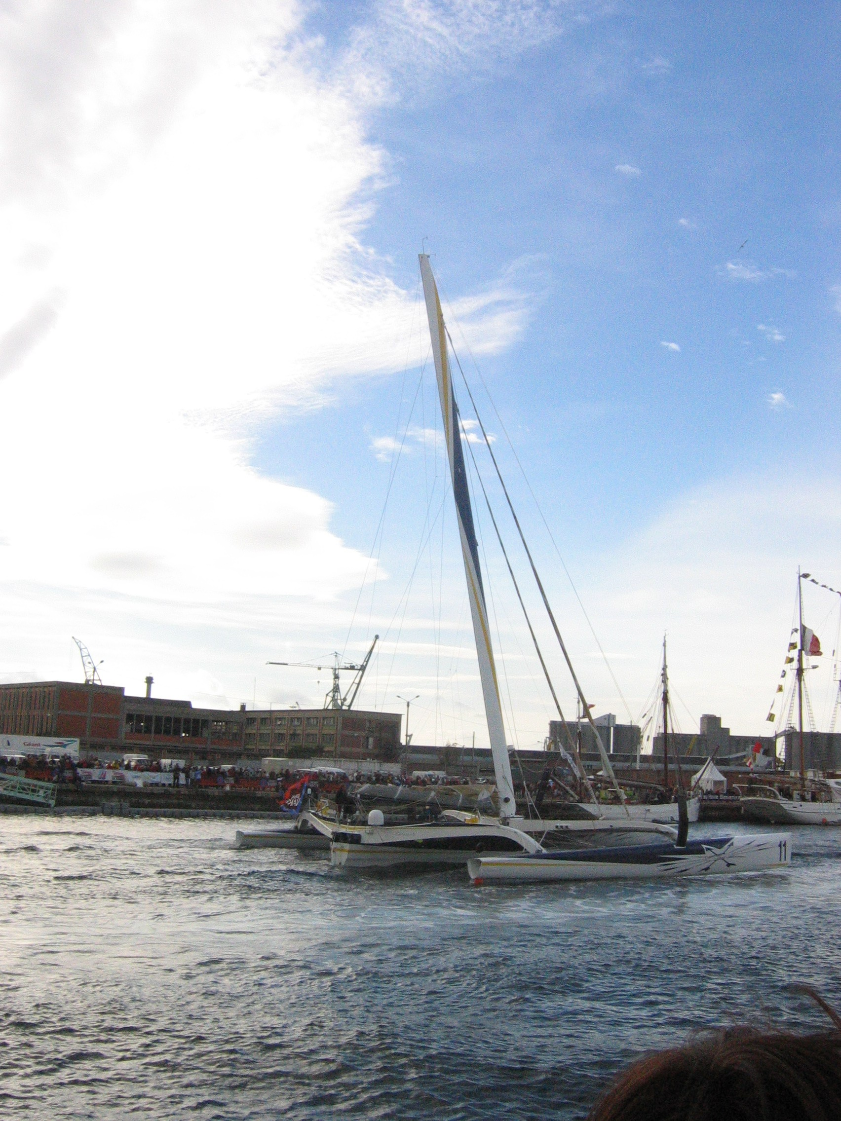 transat Jacques Vabre Le Havre-Salvador de Bahia 2005 Multicoque Gitana 11 Equipage : Fred Le Peutrec & Yann Guichard (France) Date : le jour du départ, dimanche 6 novembre 2005, Le Havre, bassin Paul Vatine Photographie prise par l'utilisateur Urban